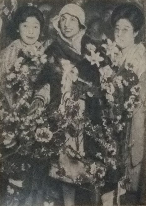 1922年の訪日時のアンナ・パヴロワ